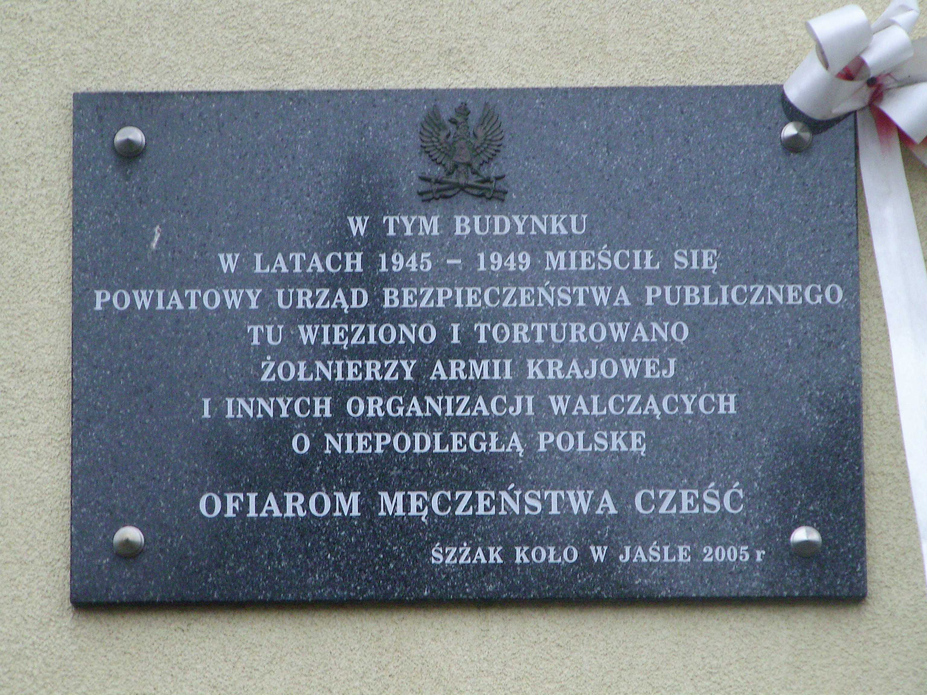 Tablica pamiątkowa na siedzibie dawnego Powiatowego Urzędu Bezpieczeństwa Publicznego w Jaśle.